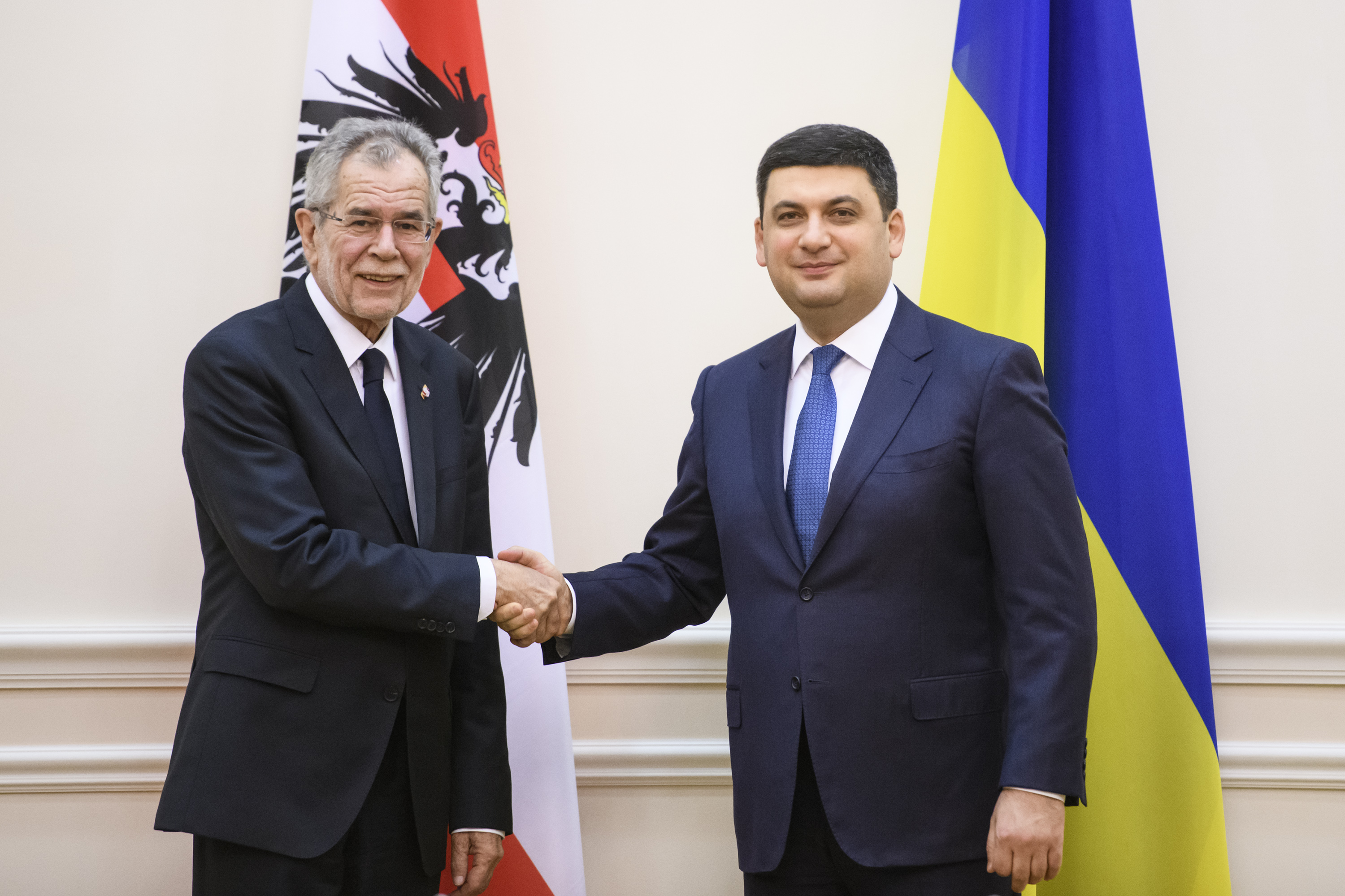 Володимир Гройсман провів зустріч з Федеральним президентом Республіки Австрія Александром Ван дер Белленом опубліковано 14 березня 2018 року о 17:45